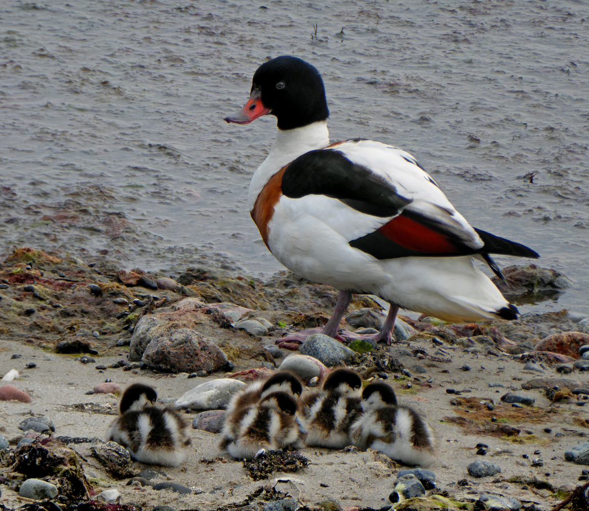 Adult hona med fem ungar. Världens ände Ystad 6 Juni 2017.